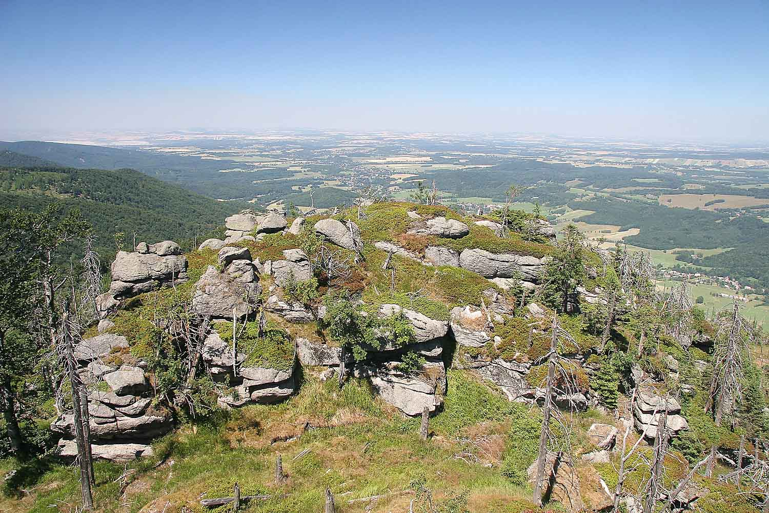 Jizerské hory - Polední kameny, Jizera Mountains, district Liberec, Czech Republic autor: Prazak date: 19. 7. 2006